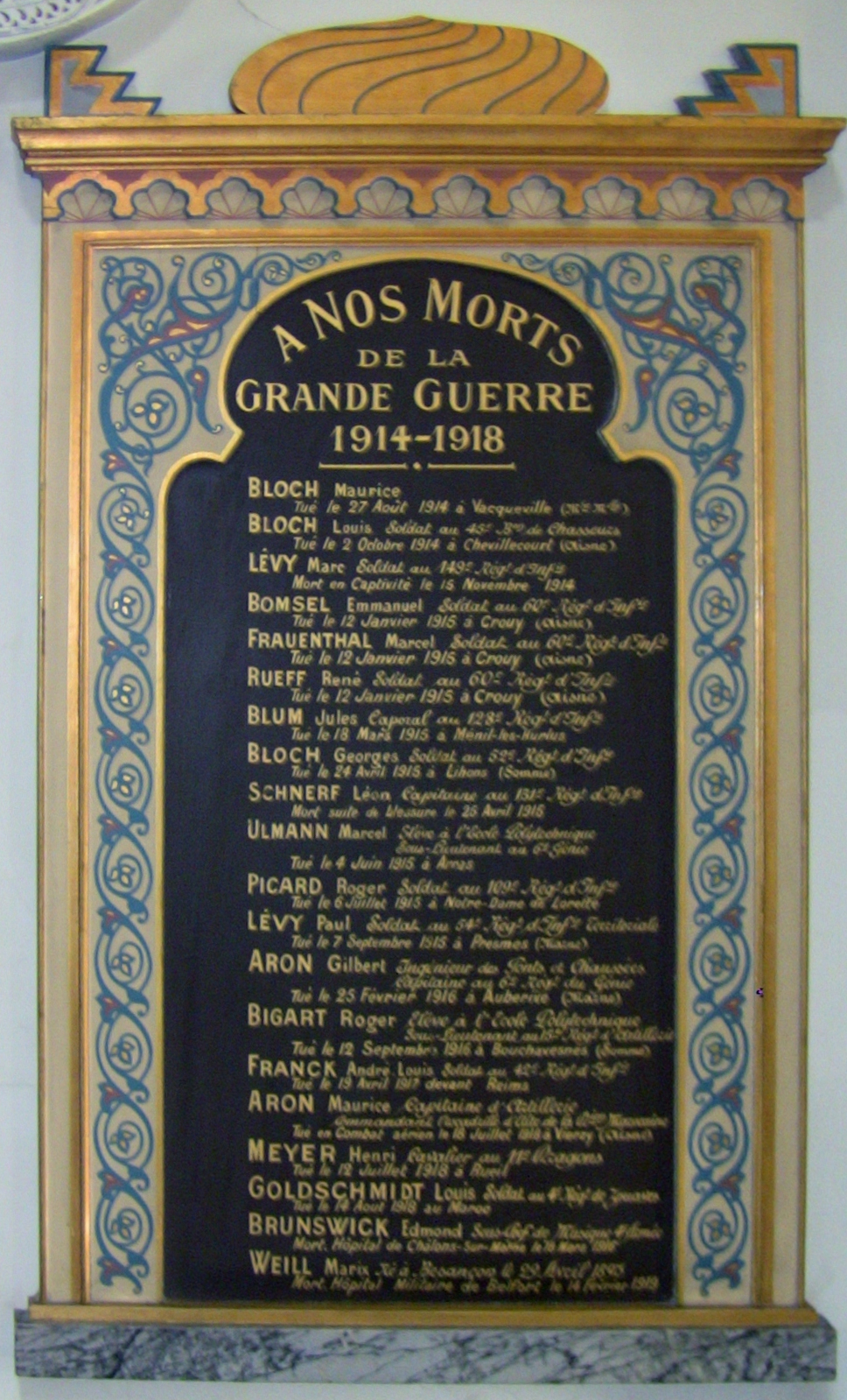 Plaque Juifs morts durant la 1ere guerre mondiale de la Synagogue de Besançon.